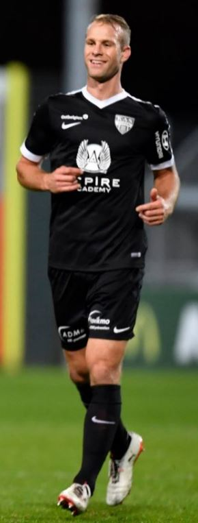 Siebe Blondelle (Eupen-Rupel Boom)